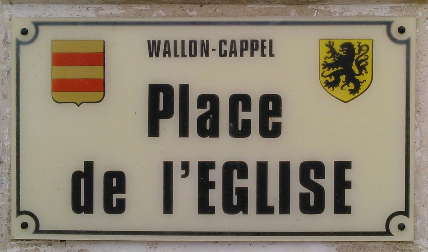 Plaque de rue, à Wallon-Cappel, Place de l'Eglise